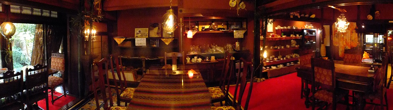 Edoshinden Company（丹波篠山江戸親伝）篠山市乾新町